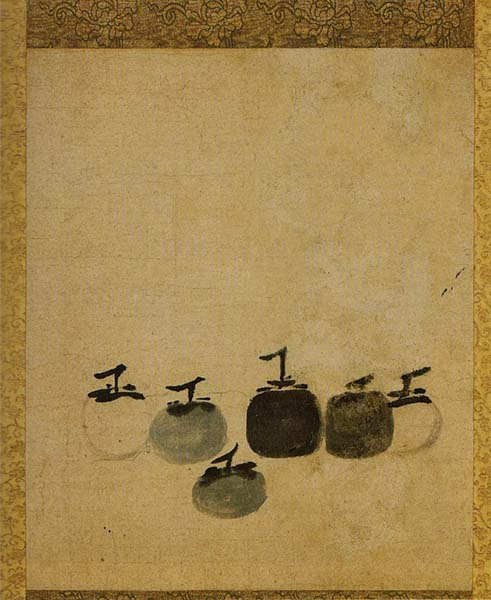 中文（中国大陆）: 牧谿《六柿图》